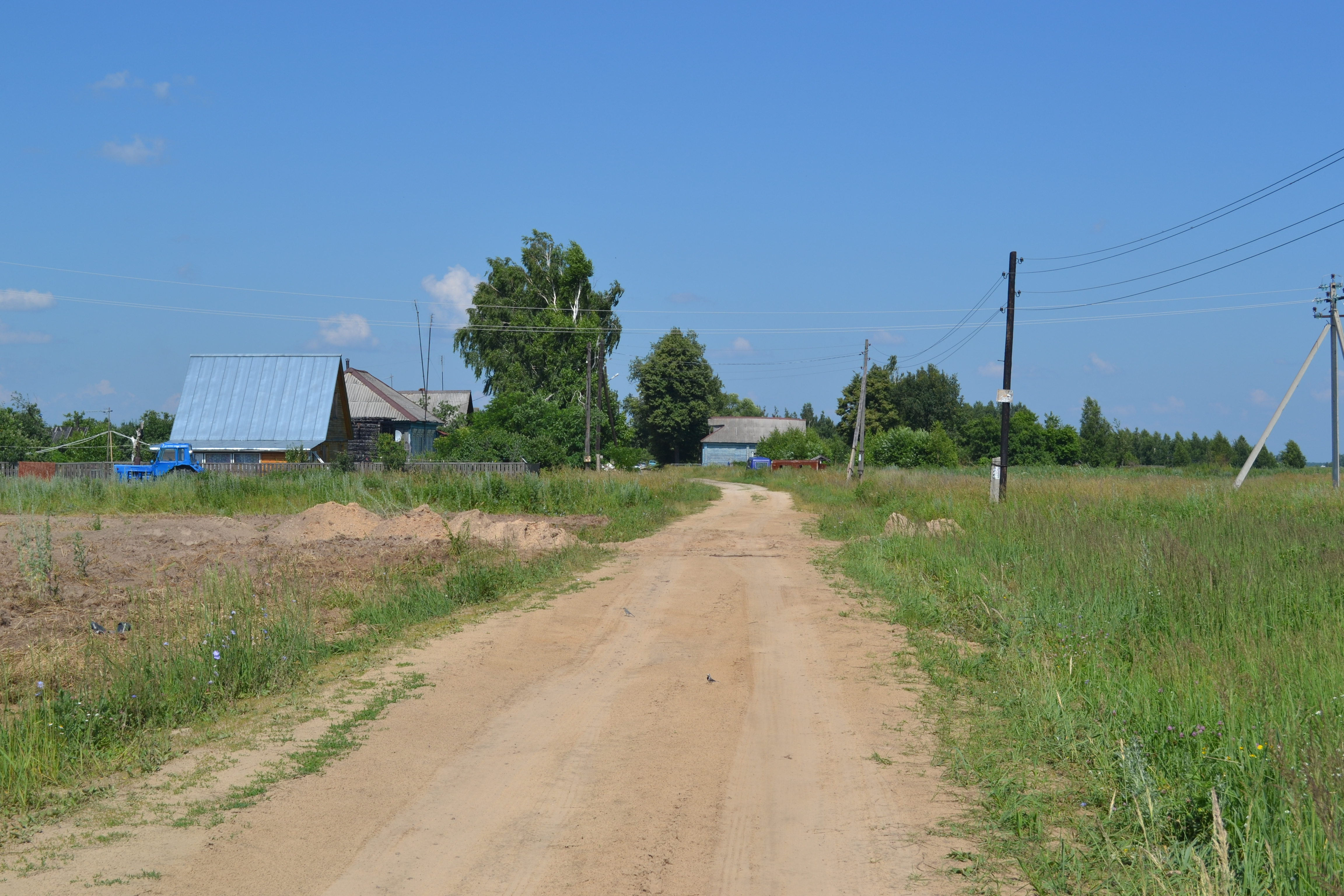 Въезд в деревню Ново-Черкасово (Шатурский район)